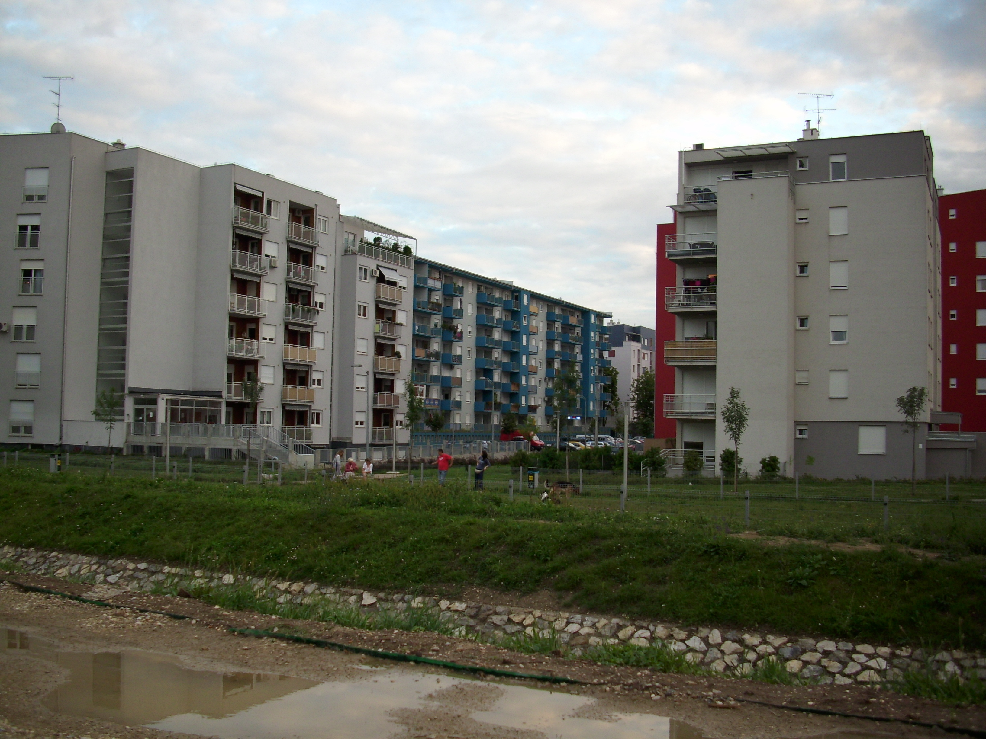 Zagreb Spansko Oranice (POS)